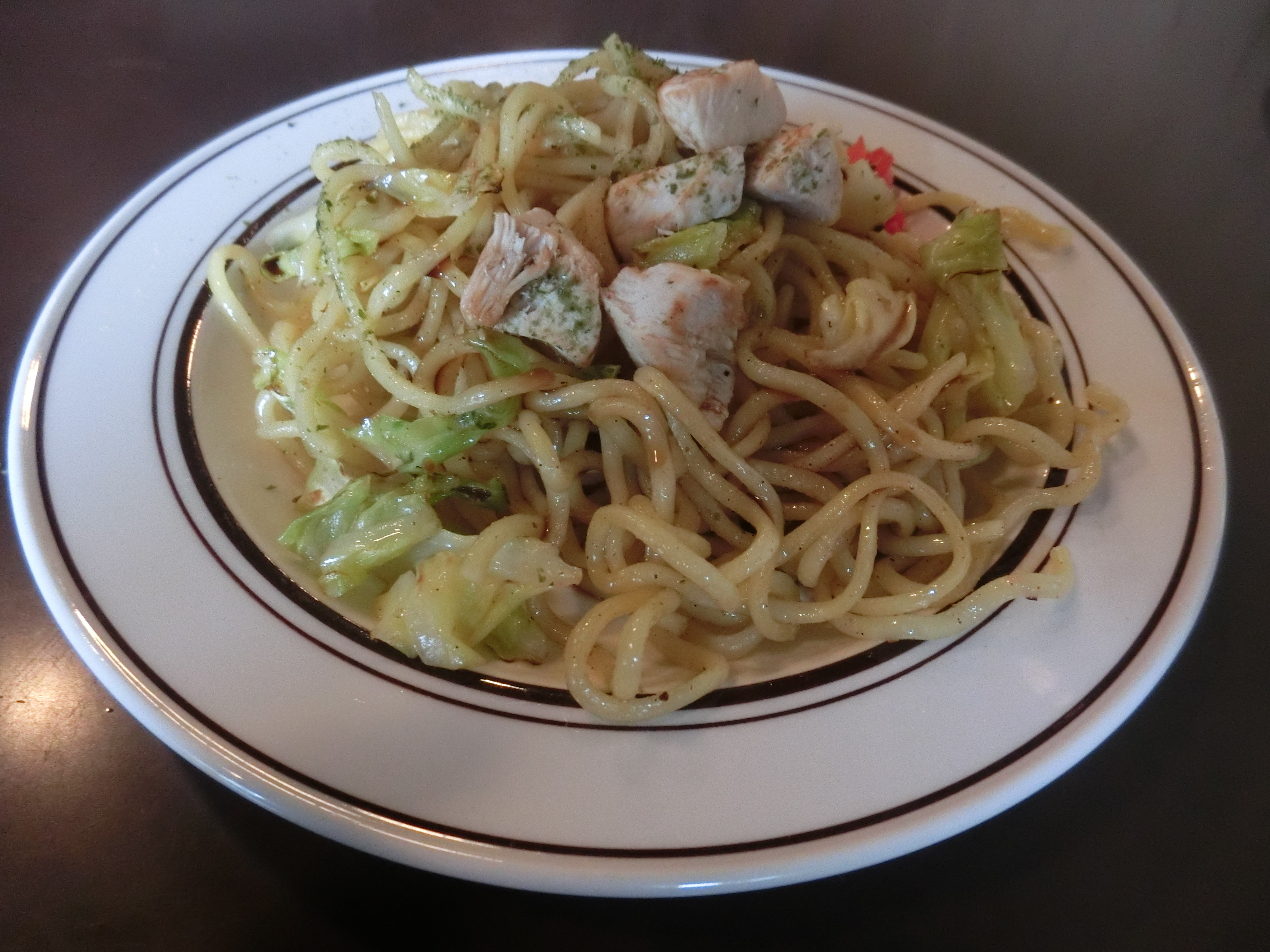 岐阜県美濃加茂市の料理、美濃加茂焼きそば。